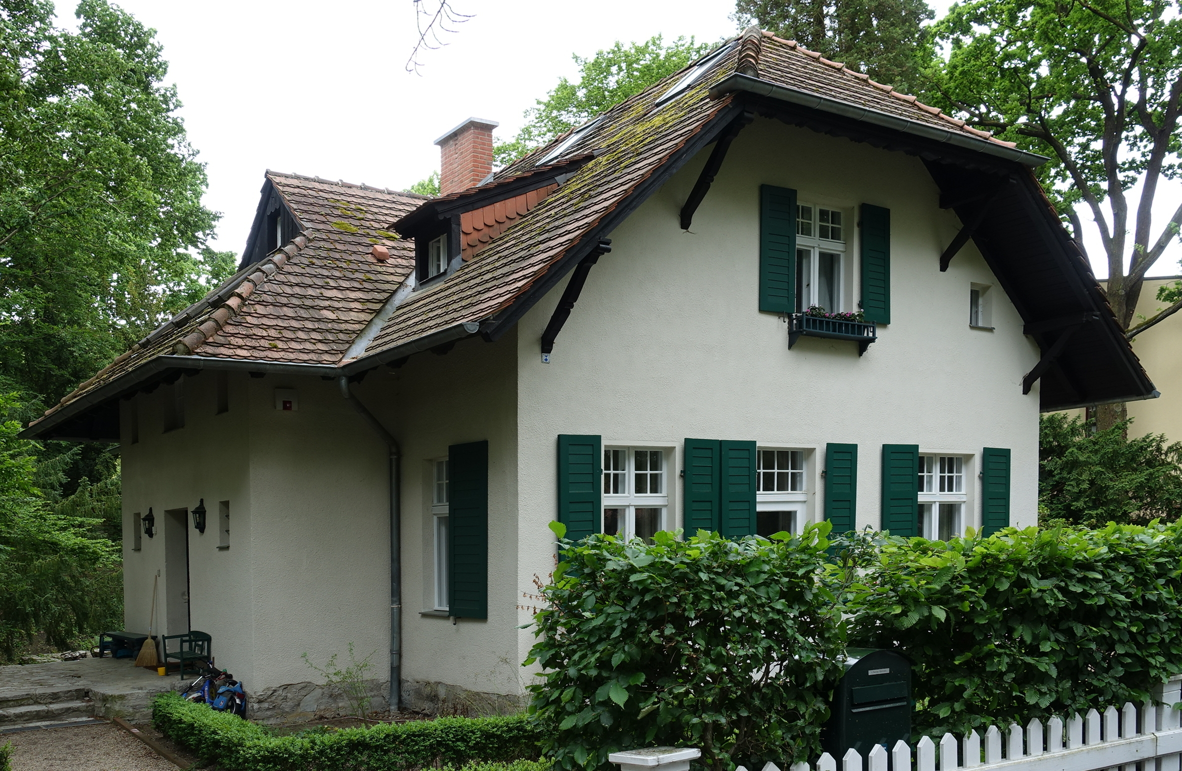 Wohnhaus